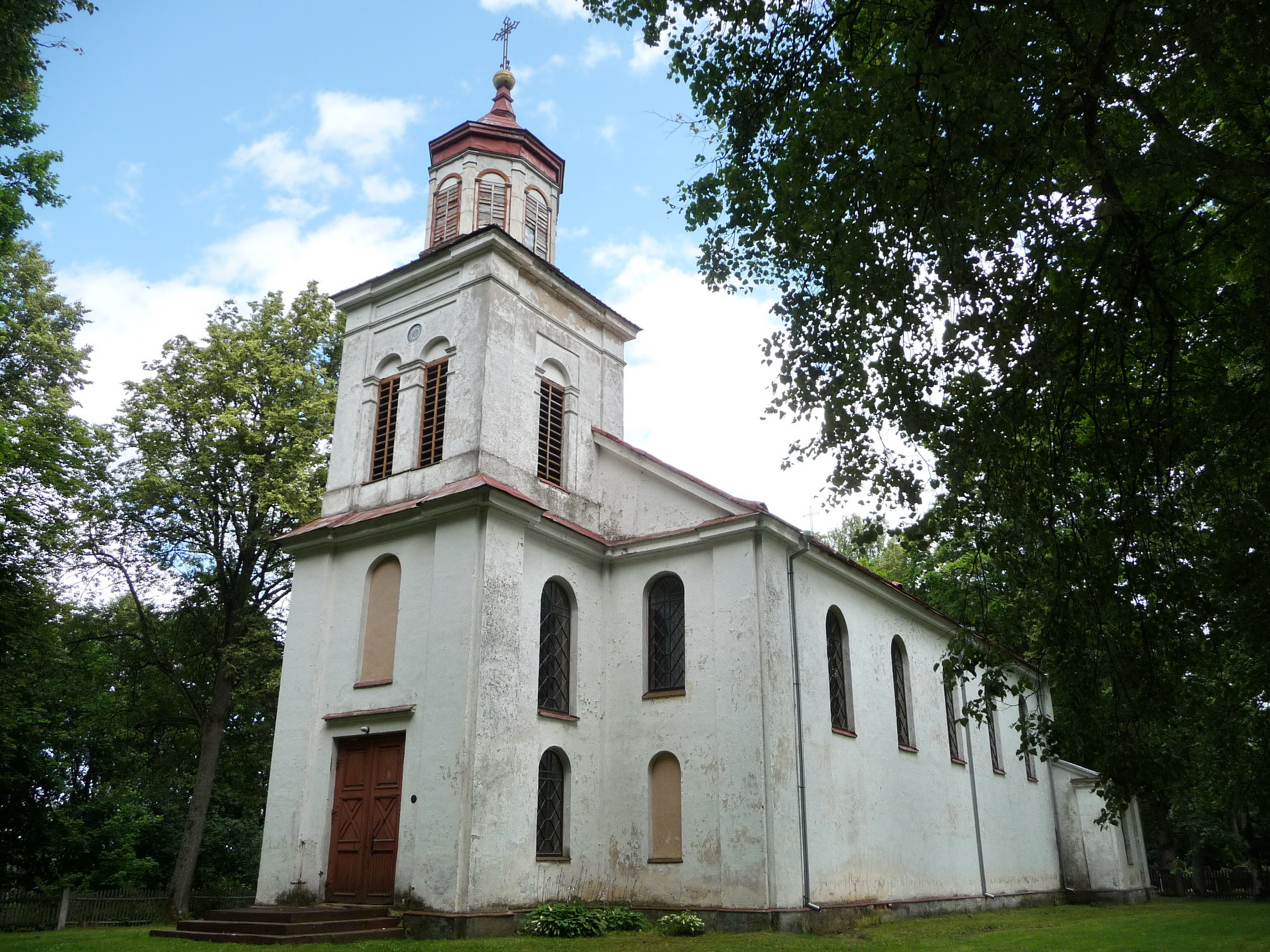 Žemosios Panemunės Šv. Vincento Pauliečio bažnyčia